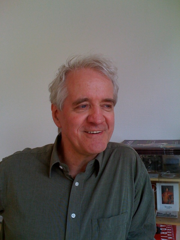 Fotografie von Robert von Lucius (* 1949)